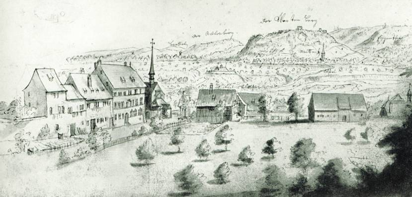 Blick auf St. Jakob an der Birs mit dem Wartenberg im Hintergrund. Links das Gebäudeensemble des in die Siedlungsmauer hineingebauten Siechenhauses und die Kirche von St. Jakob; in der Mitte die Ziegelhütte und dahinter das Zollhaus/Wirtshaus; rechts die Schäferei und die Walke.